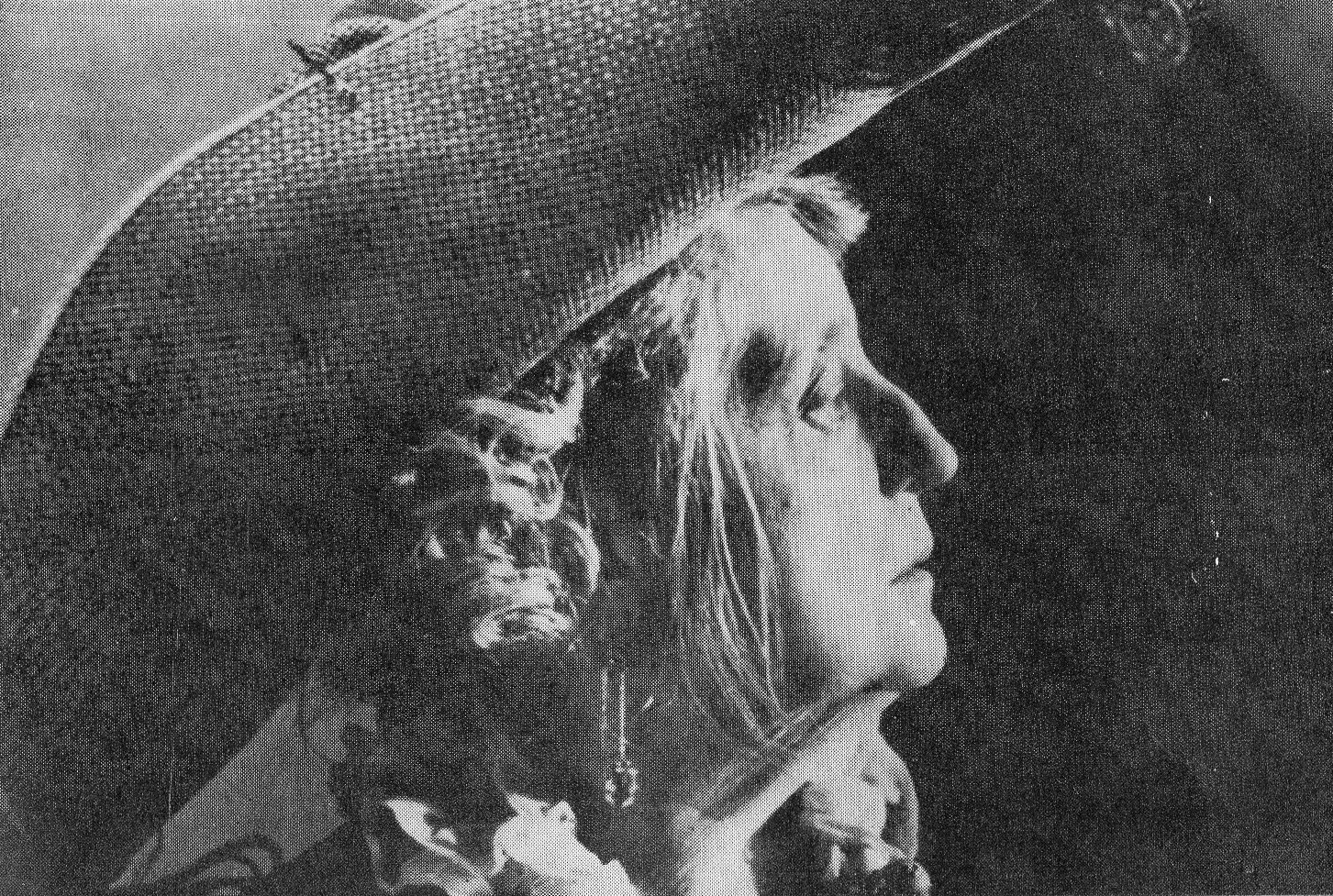 Wariatka z Chaillot na deskach Teatru TUR, Kraków - 1947r.